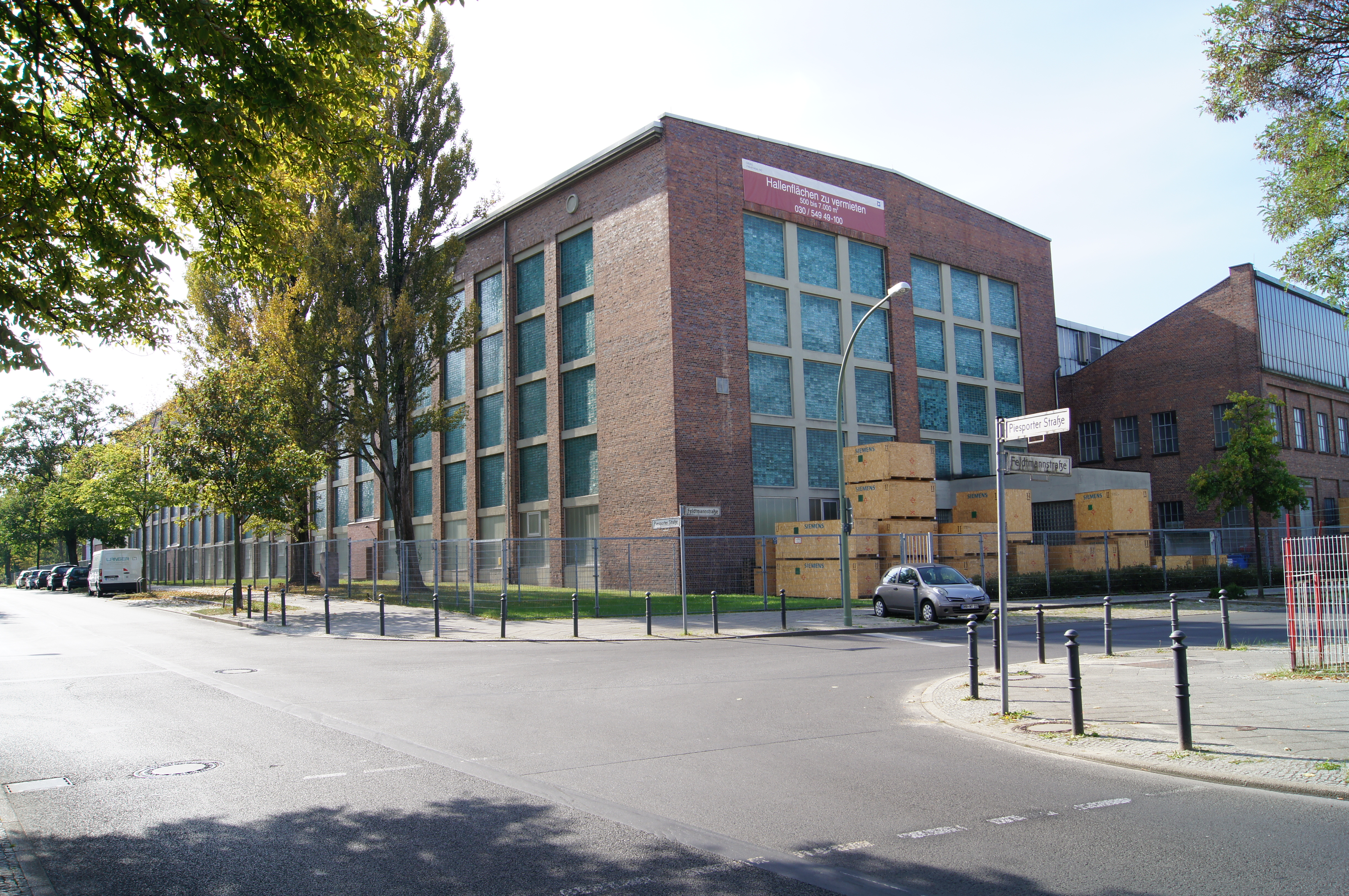 Produktionhalle und Große Produktionshalle, Piesporter Straße 50, Berlin-WeißenseeThis is a photograph of an architectural monument.